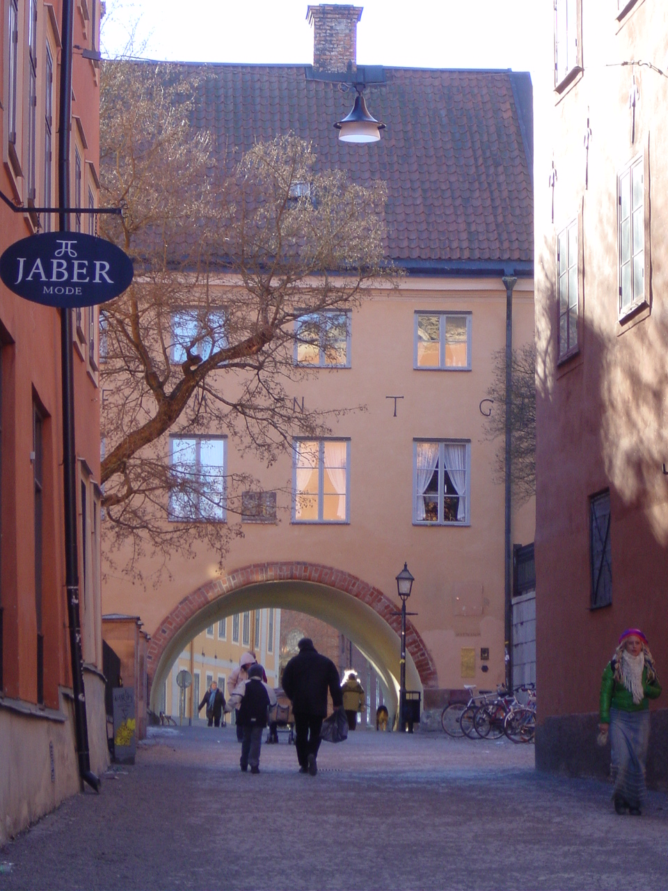 Uppsala.